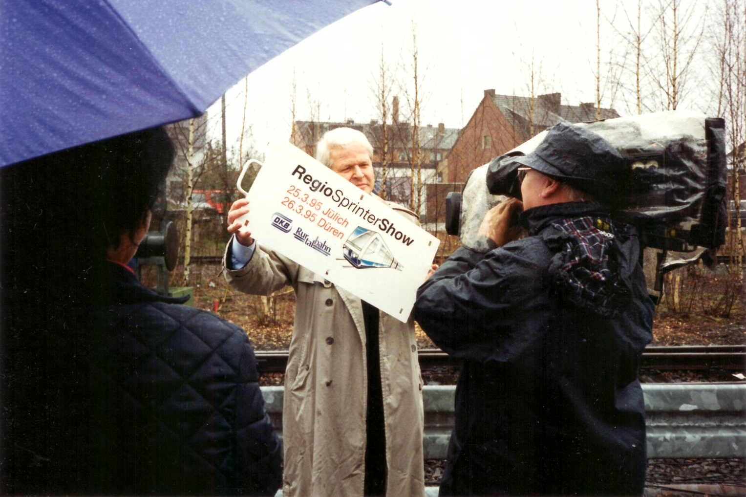 Die Dürener Kreisbahn (DKB) übernahm im Mai 1993 zwei Strecken von der Bundesbahn, welche die DB stilllegen wollte. Im September 1993 bestellte die DKB neuartige Fahrzeuge vom Typ RegioSprinter, die bislang nur auf dem Papier existierten. An beidem hatte der damalige Landrat und SPD-MdL Adi Retz erheblichen Anteil. Bereits im März 1995 war das erste Fahrzeug fertig und wurde am 25. in Jülich und am 26. in Düren als "RegioSprinterShow" der Öffentlichkeit und der Presse vorgestellt. Die DKB vermarktete schon damals ihre beiden Bahnstrecken als "Rurtalbahn", zum 1.1.2003 wurde ein neues Unternehmen namens Rurtalbahn GmbH gegründet, in welchem die DKB aufging. Im Kreis Düren blieben die RegioSprinter bis zum 25. Februar 2019 im Einsatz, sie wurden dann nach Tschechien verkauft.